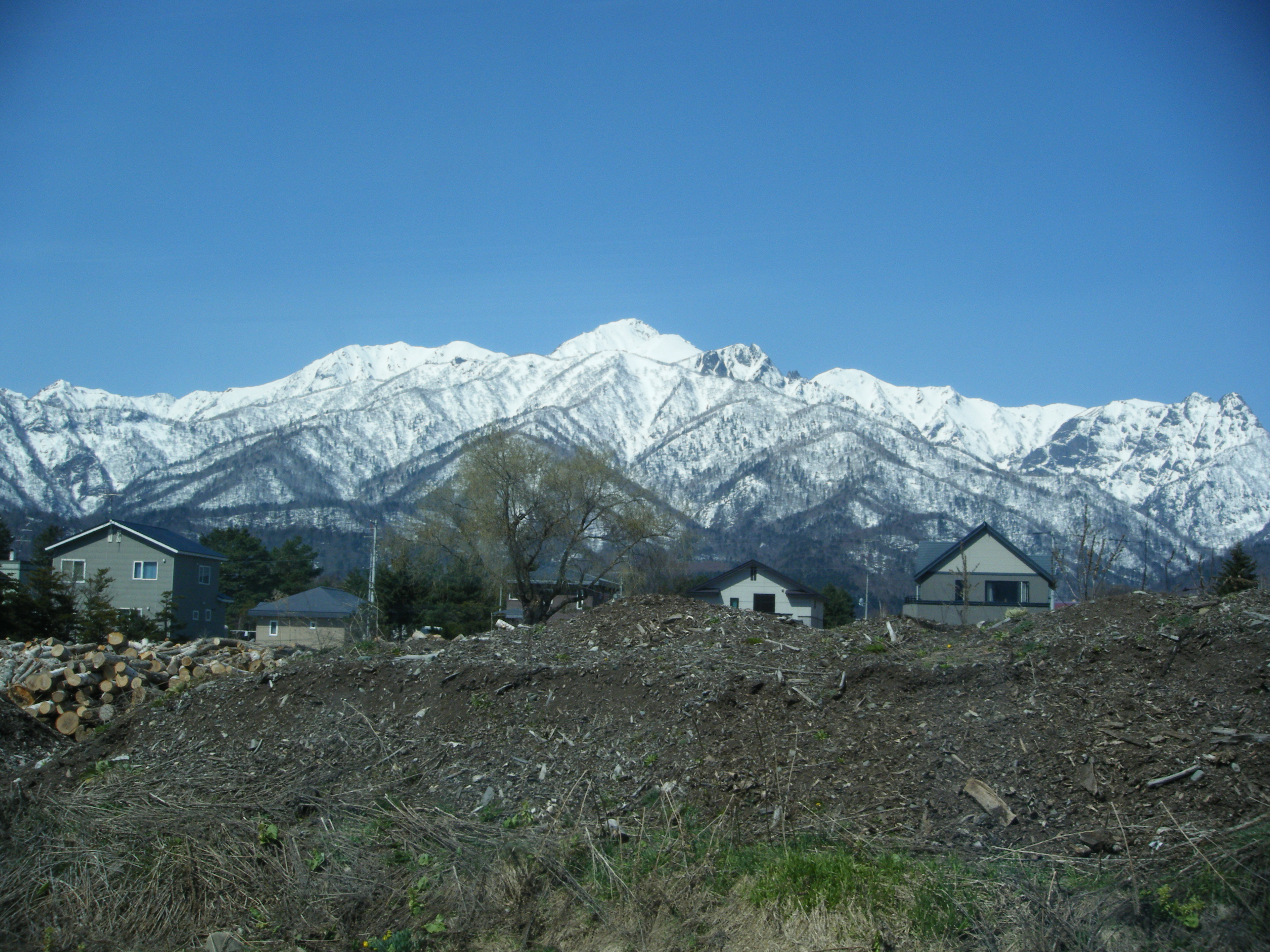 芦別岳 JR北海道根室本線山部駅より